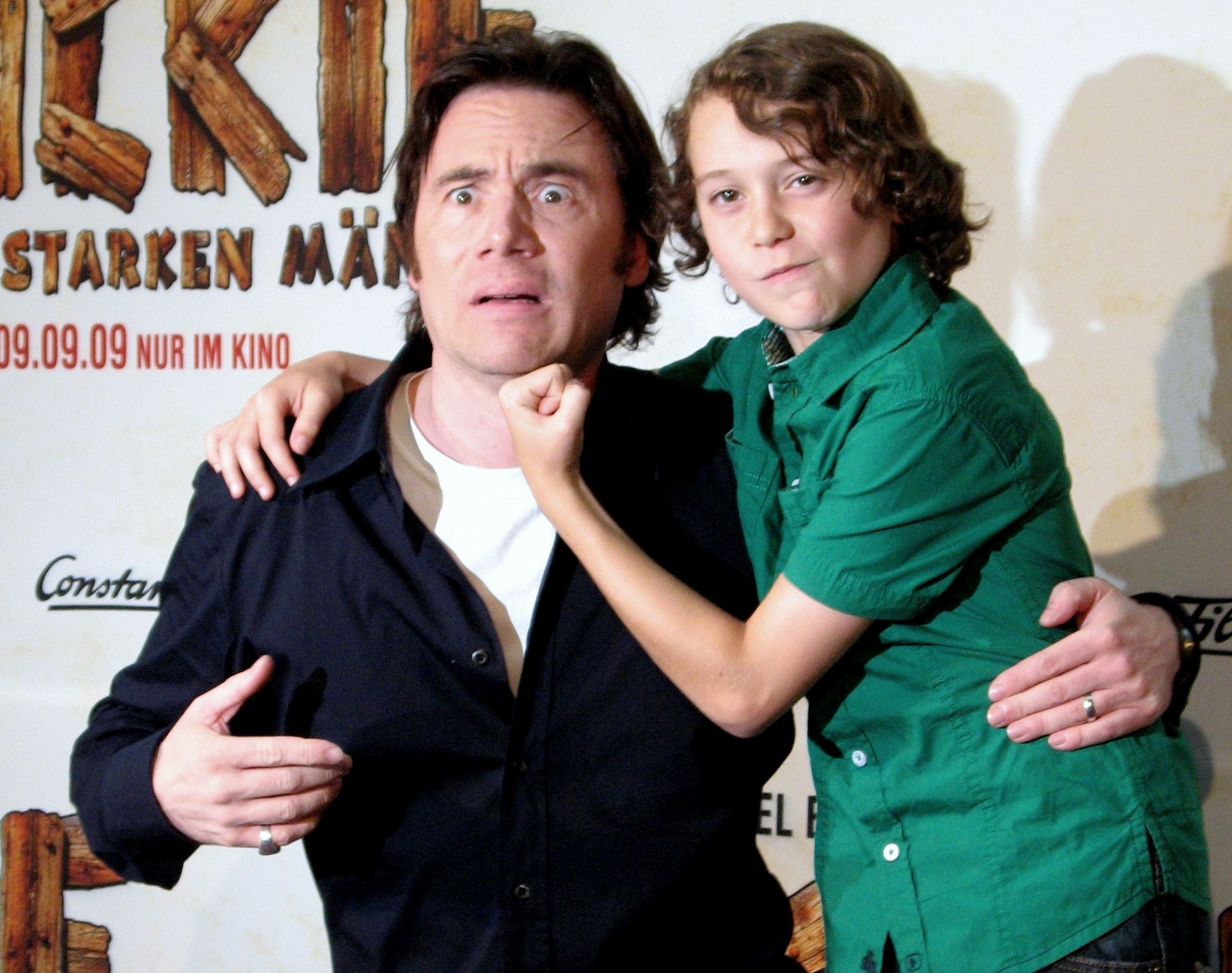 Michael Herbig mit Jonas Hämmerle bei der Pressekonferenz von "Wickie und die starken Männer", 03.08.2009